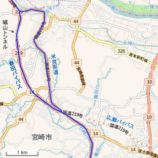 国道219号 複数路線区間の路線図 （OpenStreetMapの画像を一部修正） This map may be incomplete, and may contain errors. Don't rely solely on it for navigation.